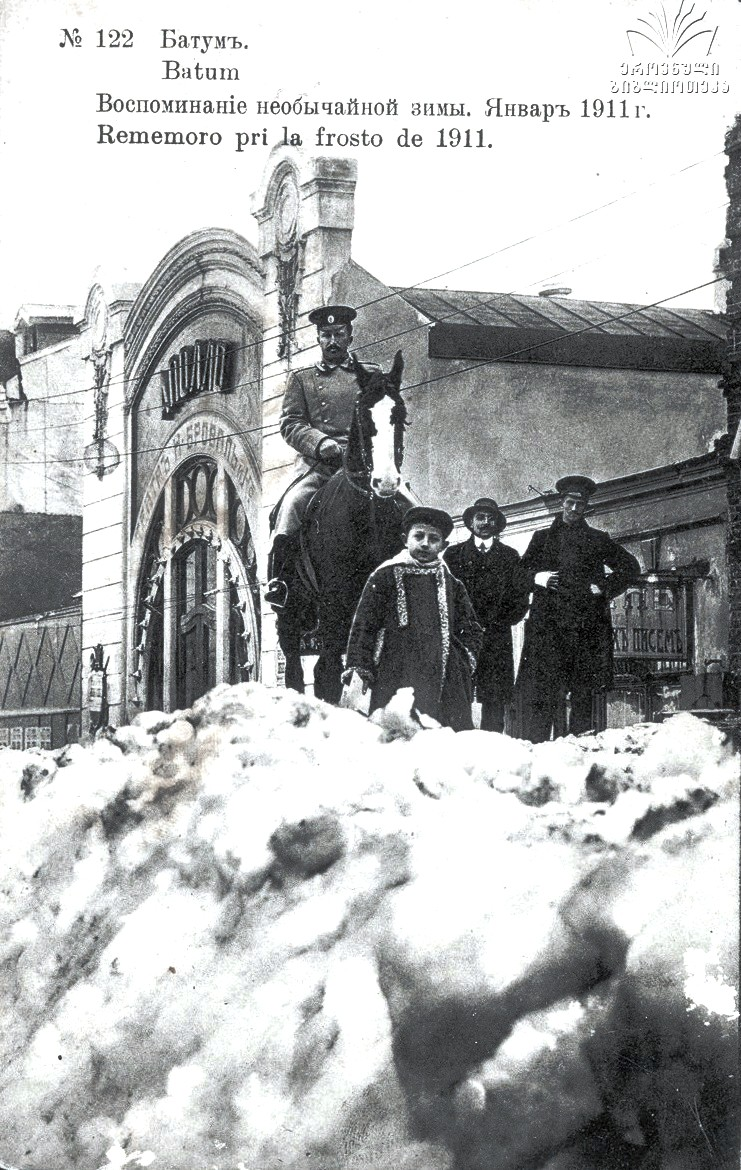 Batumi - Rememoro prila frosto de 1911.